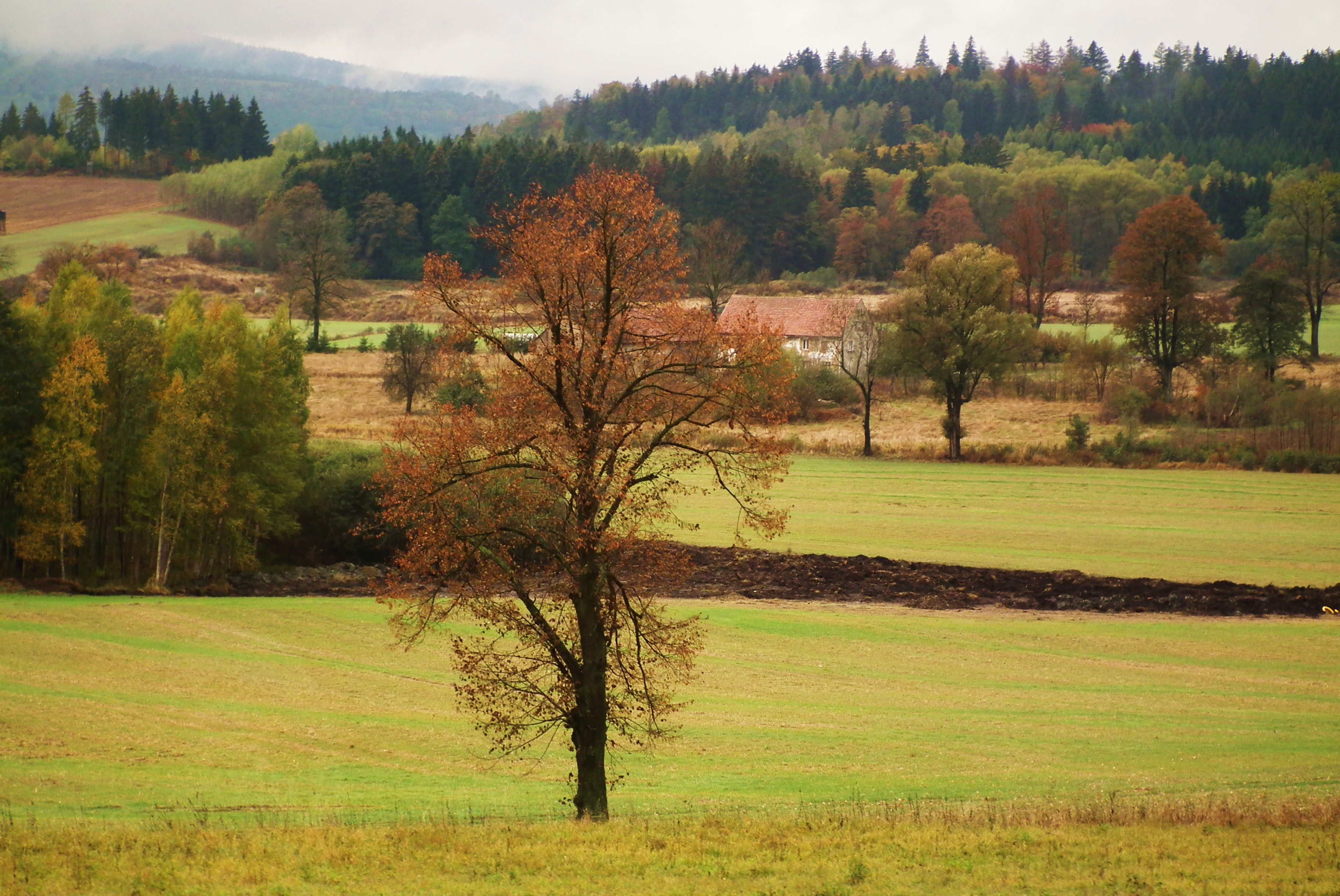 Góry Kaczawskie w rejonie Marciszowa i Świdnika.